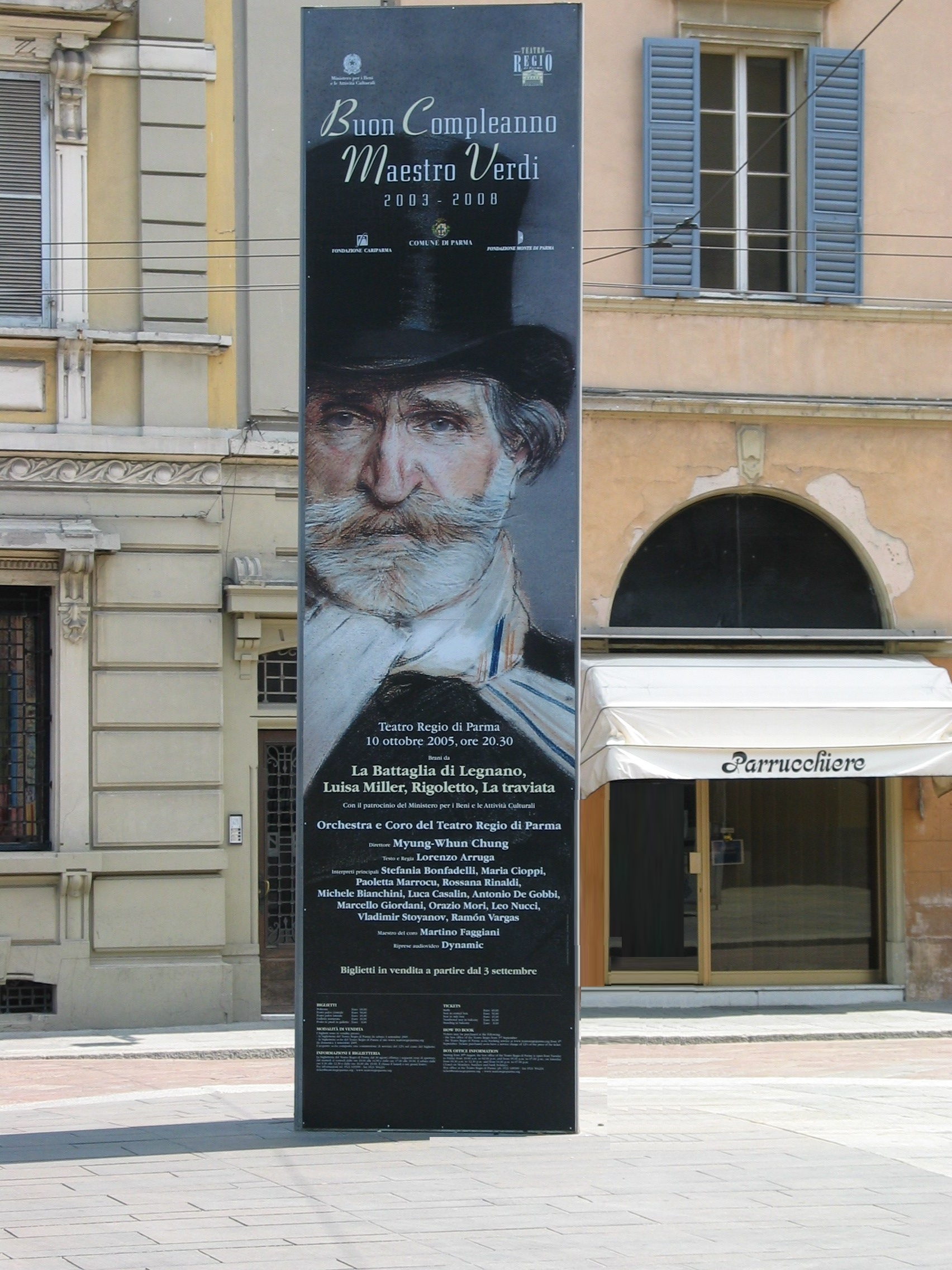 Commémoration de Verdi